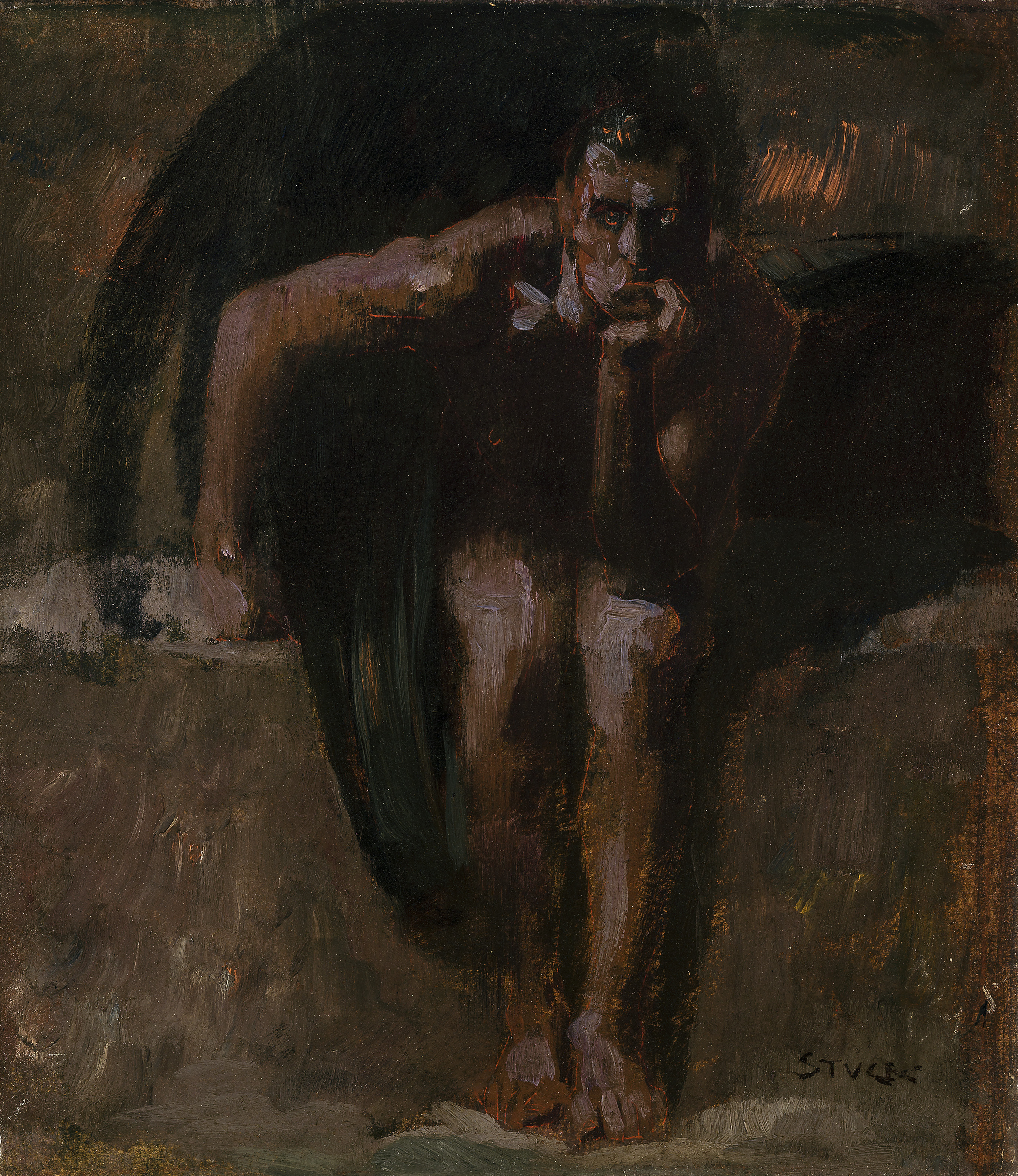 Franz von Stuck: Luzifer. Öl auf Hartfaser, 29 x 25,5cm, rechts unten signiert